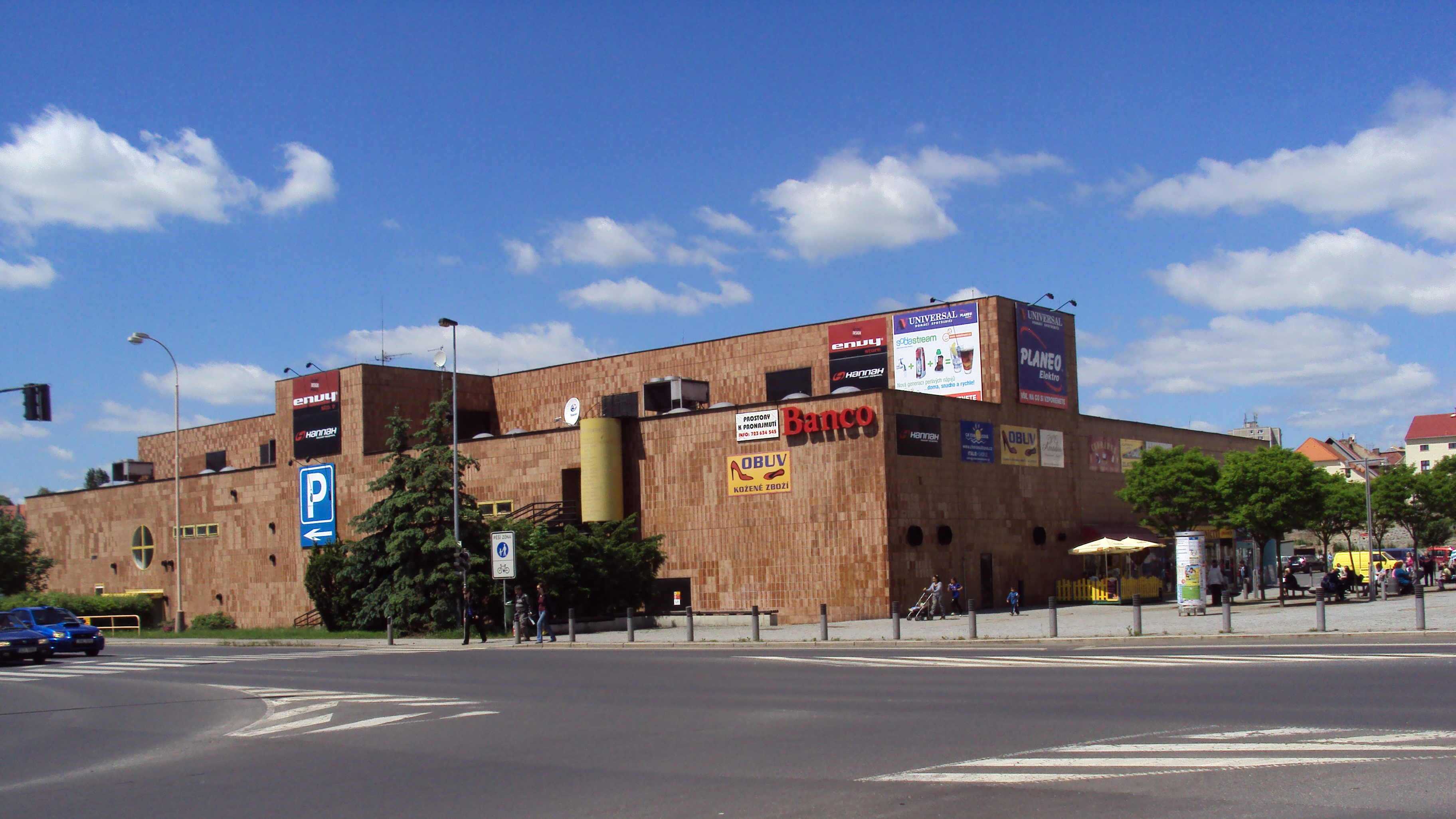 Obchodní dům Banco v České Lípě